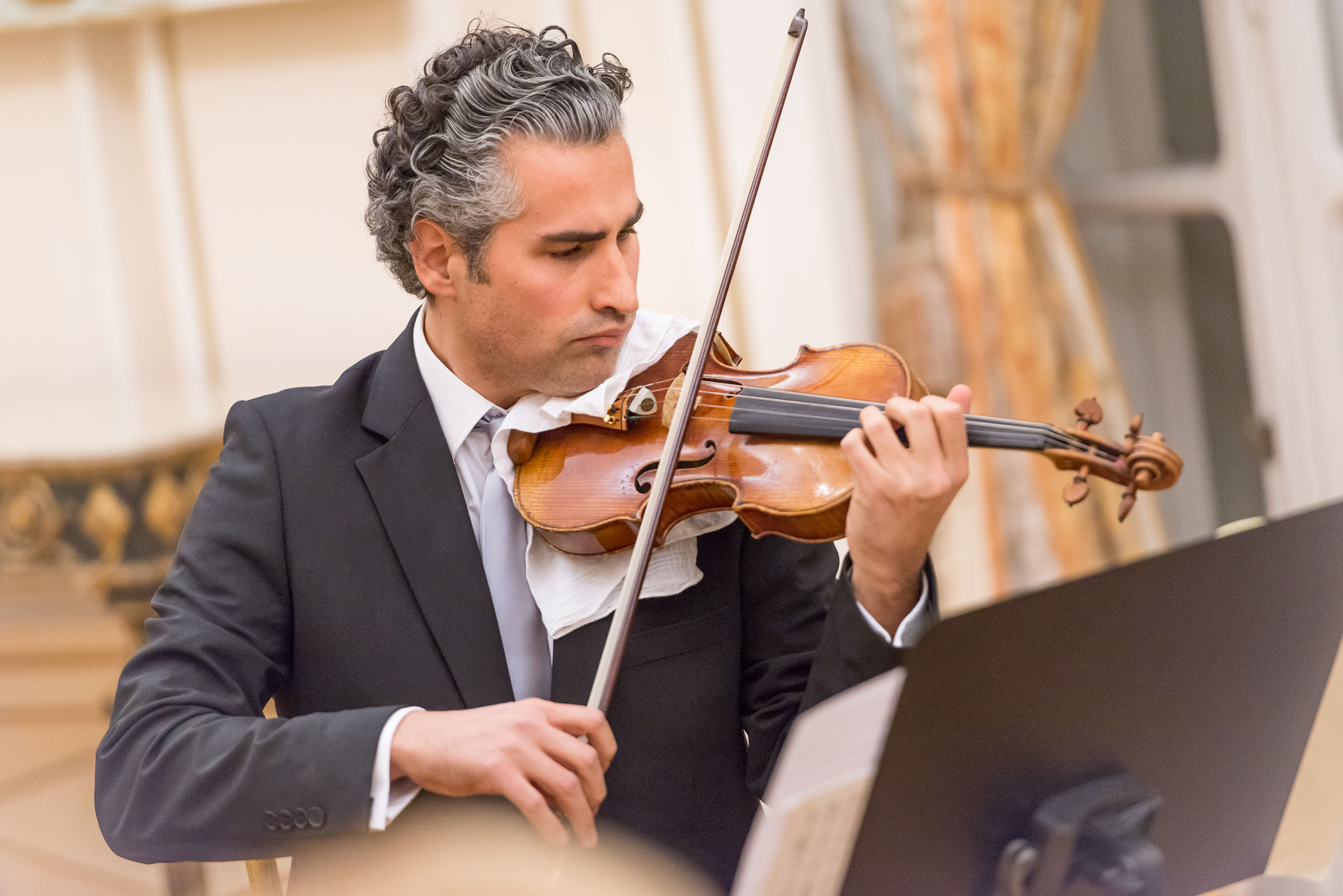 Rémy Ballot au violon, lors d'un concert à l'Ambassade de France à Vienne en octobre 2015